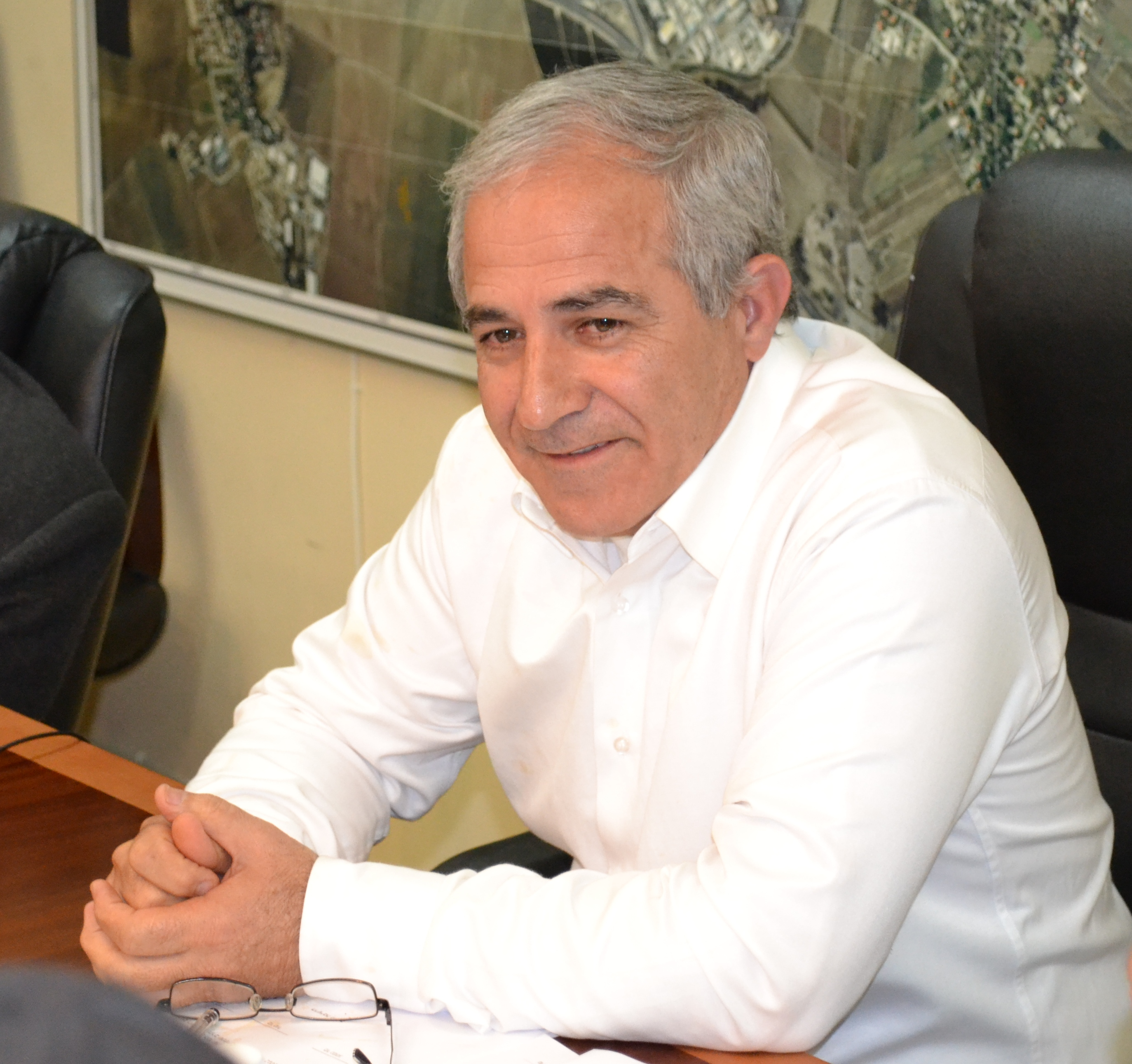 מוטי מלכה היה ראש עיריית קריית מלאכי